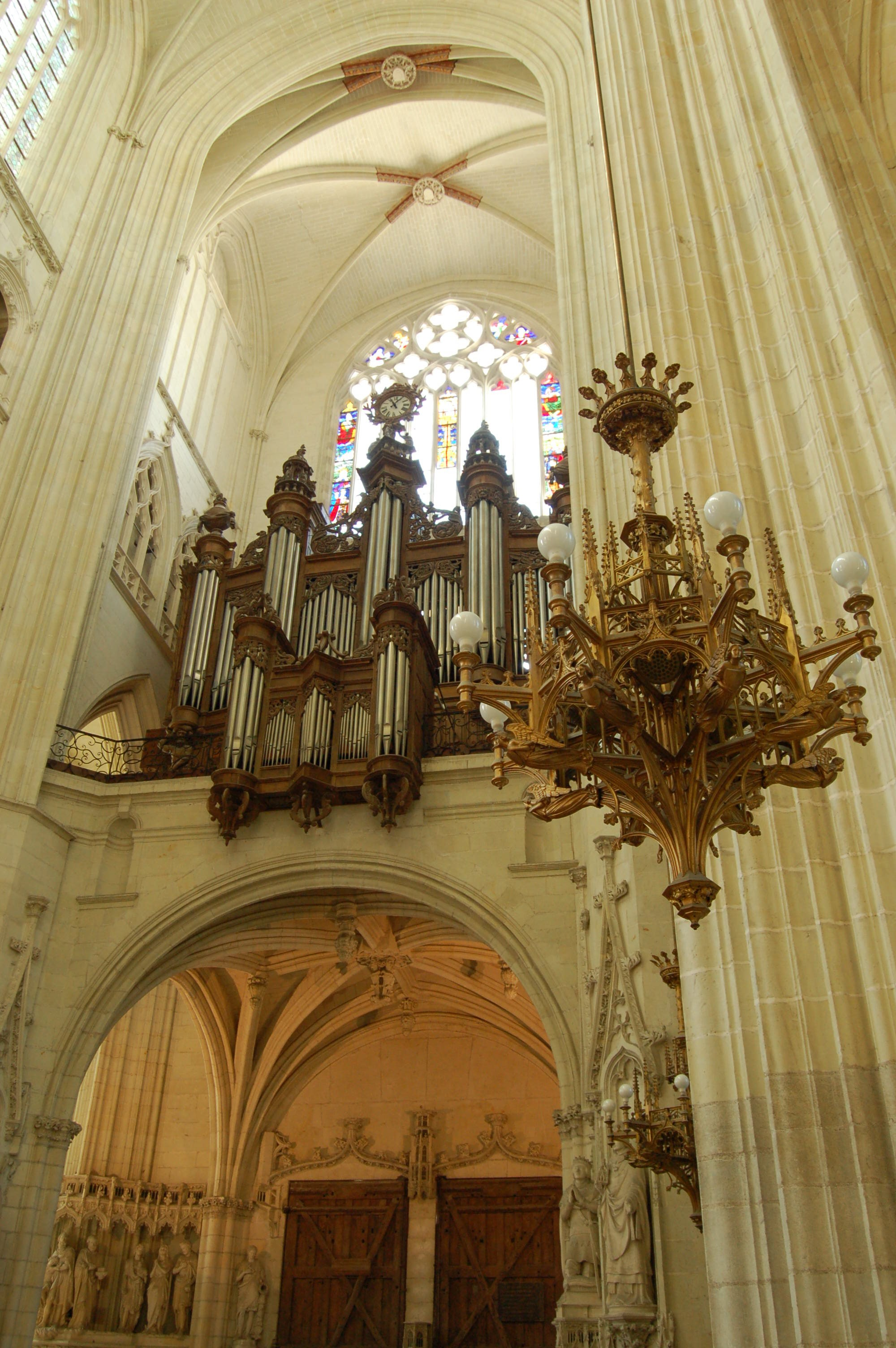 Nantes, Cathédrale Saint Pierre et Saint Paul après restauration. Tribune, buffet de l'orgue et lustre (protégé MH - réalisation de François Evellin)